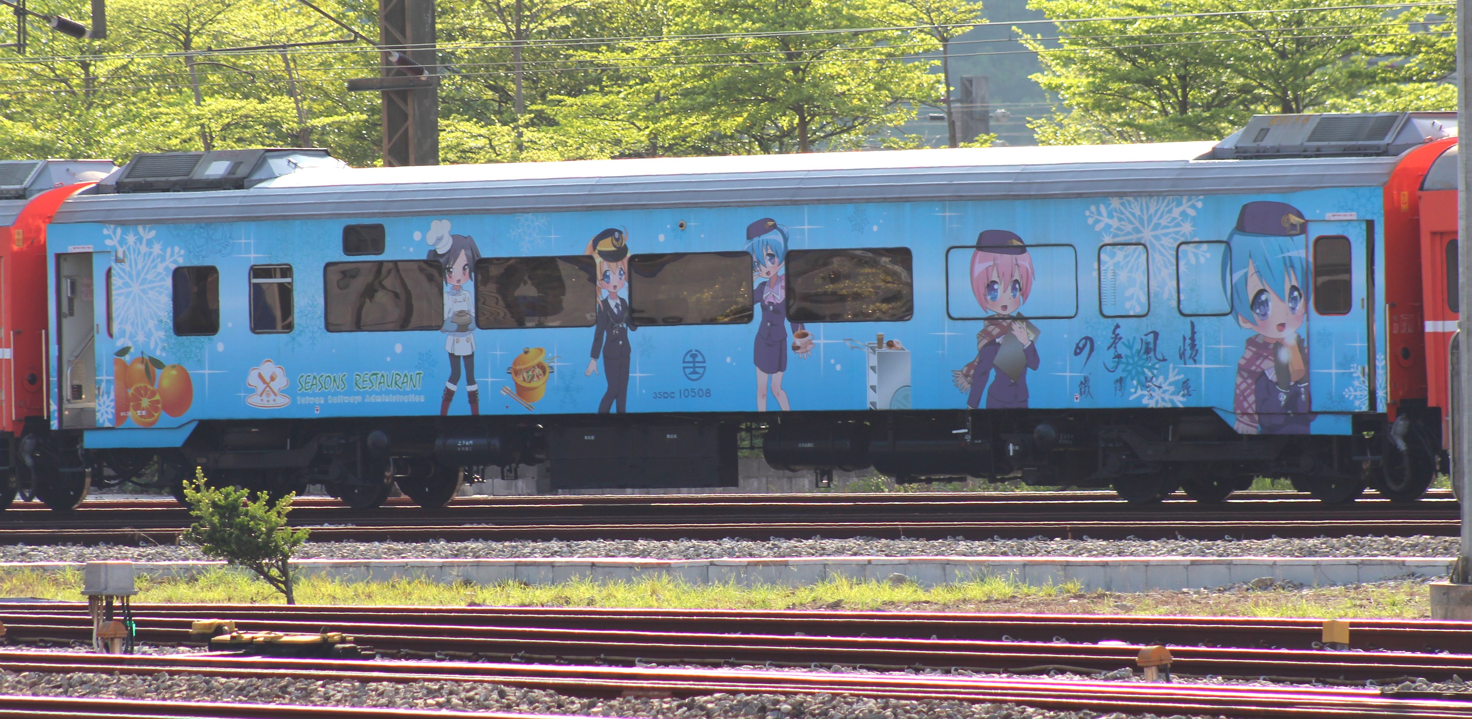 臺灣鐵路管理局莒光號餐車35DC10508，車身畫「四季風情鐵路餐廳」廣告。